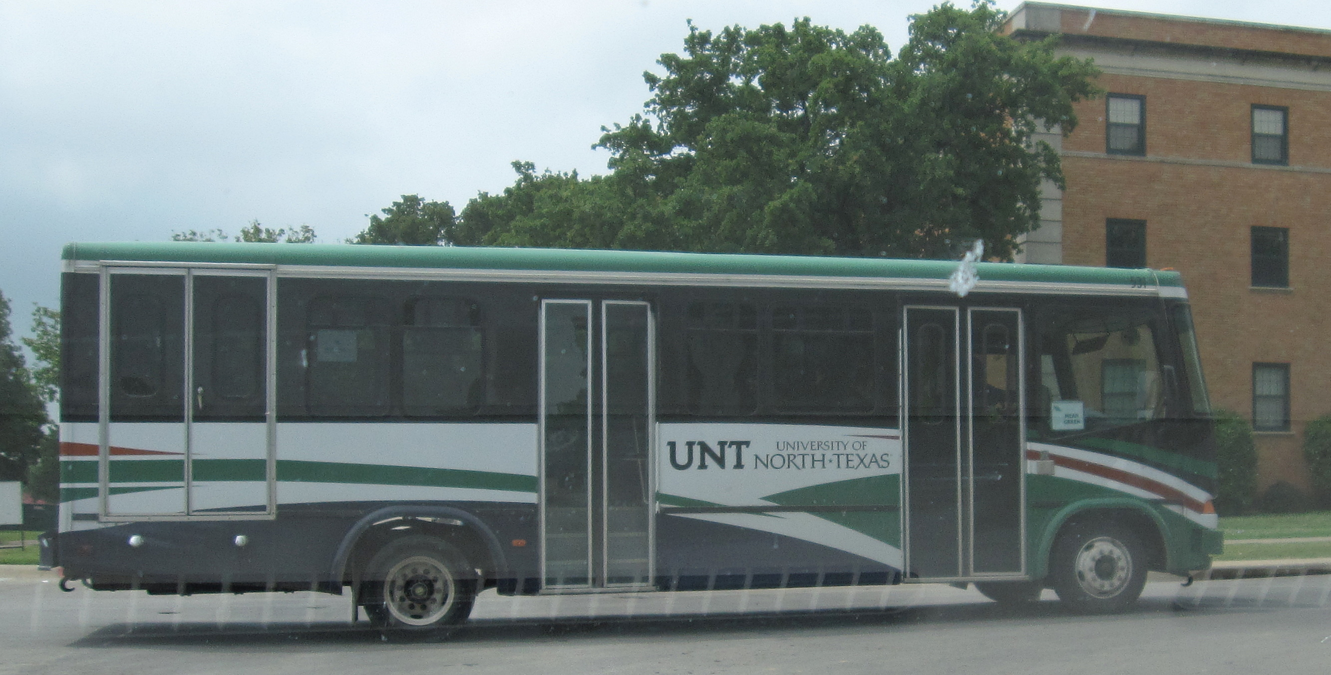 unt